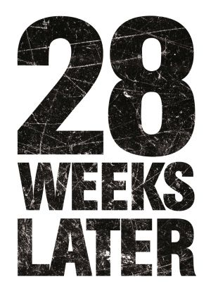 28 Weeks later, Logo